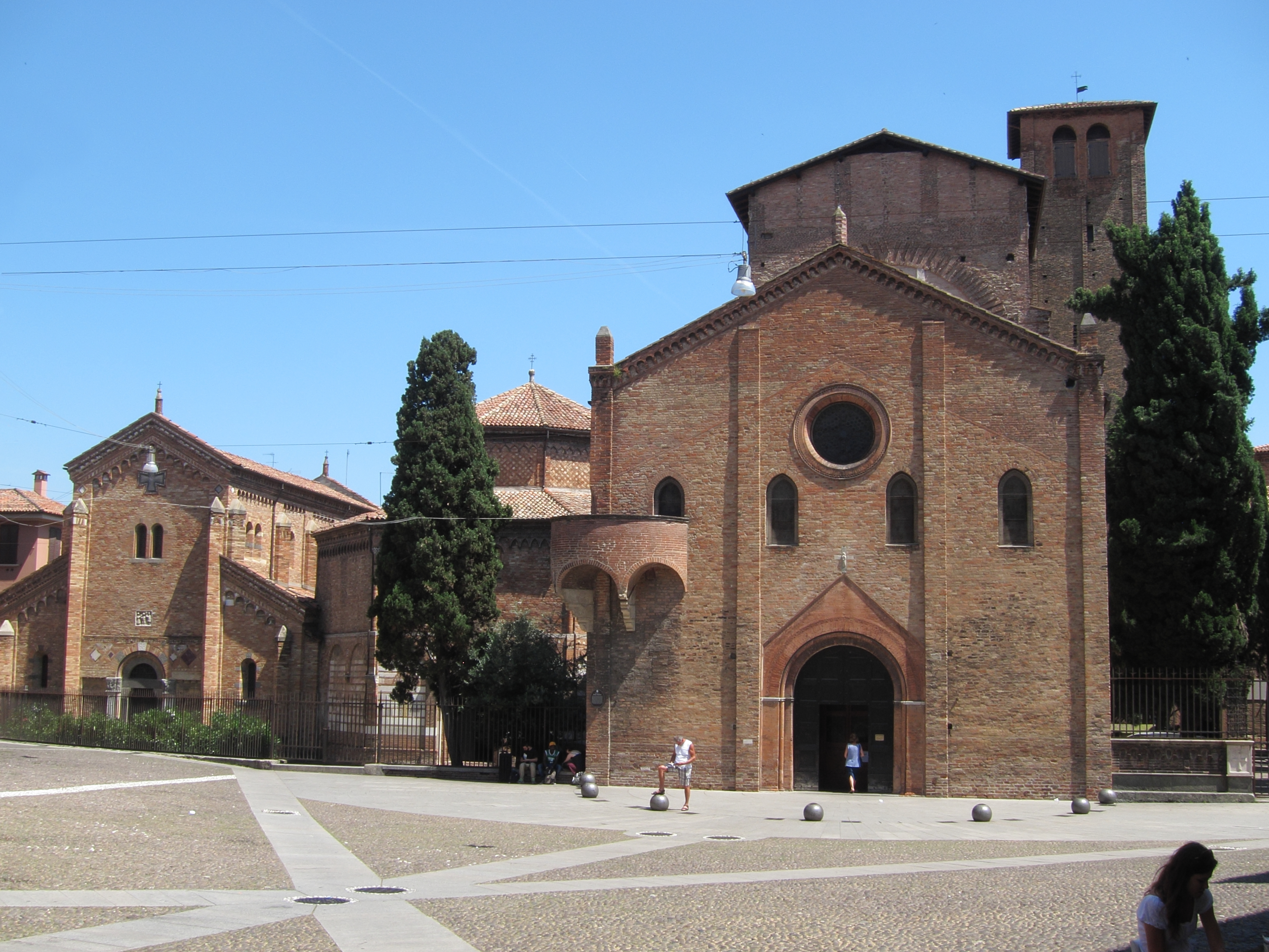 Santo Stefano (Bologna): Chiesa del Crocifisso, Santo Sepolcro, Santi Vitale e Agricola